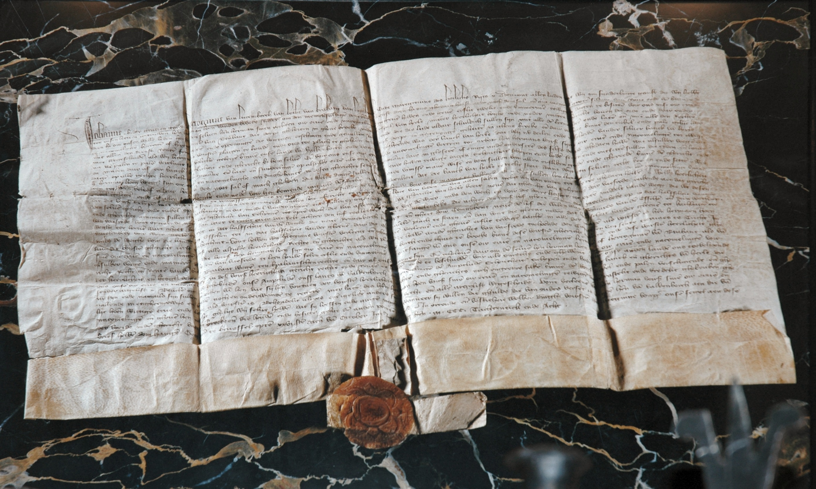 Schloss Hoensbroek - Kopie der Schenkungsurkunde